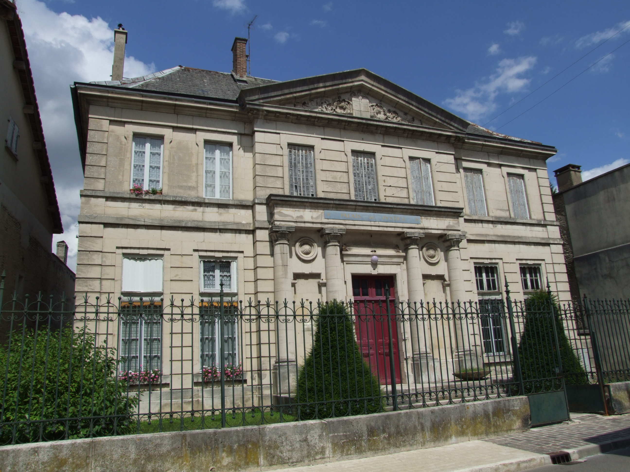 Bar-sur-Aube, Aube, Champagne-Ardennes, FRANCE